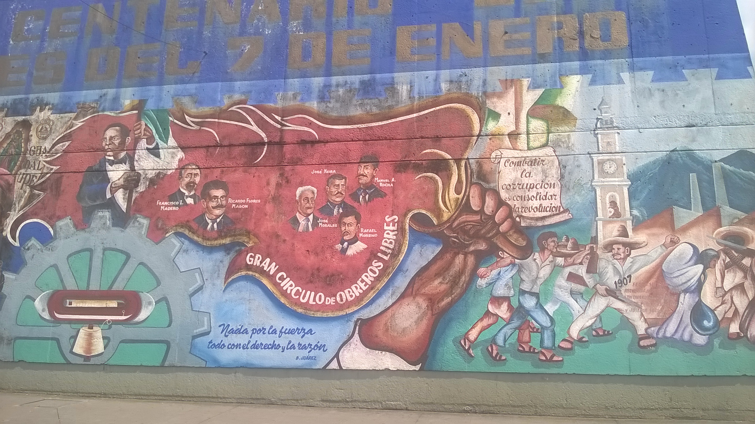 Mural de Río Blanco, Veracruz